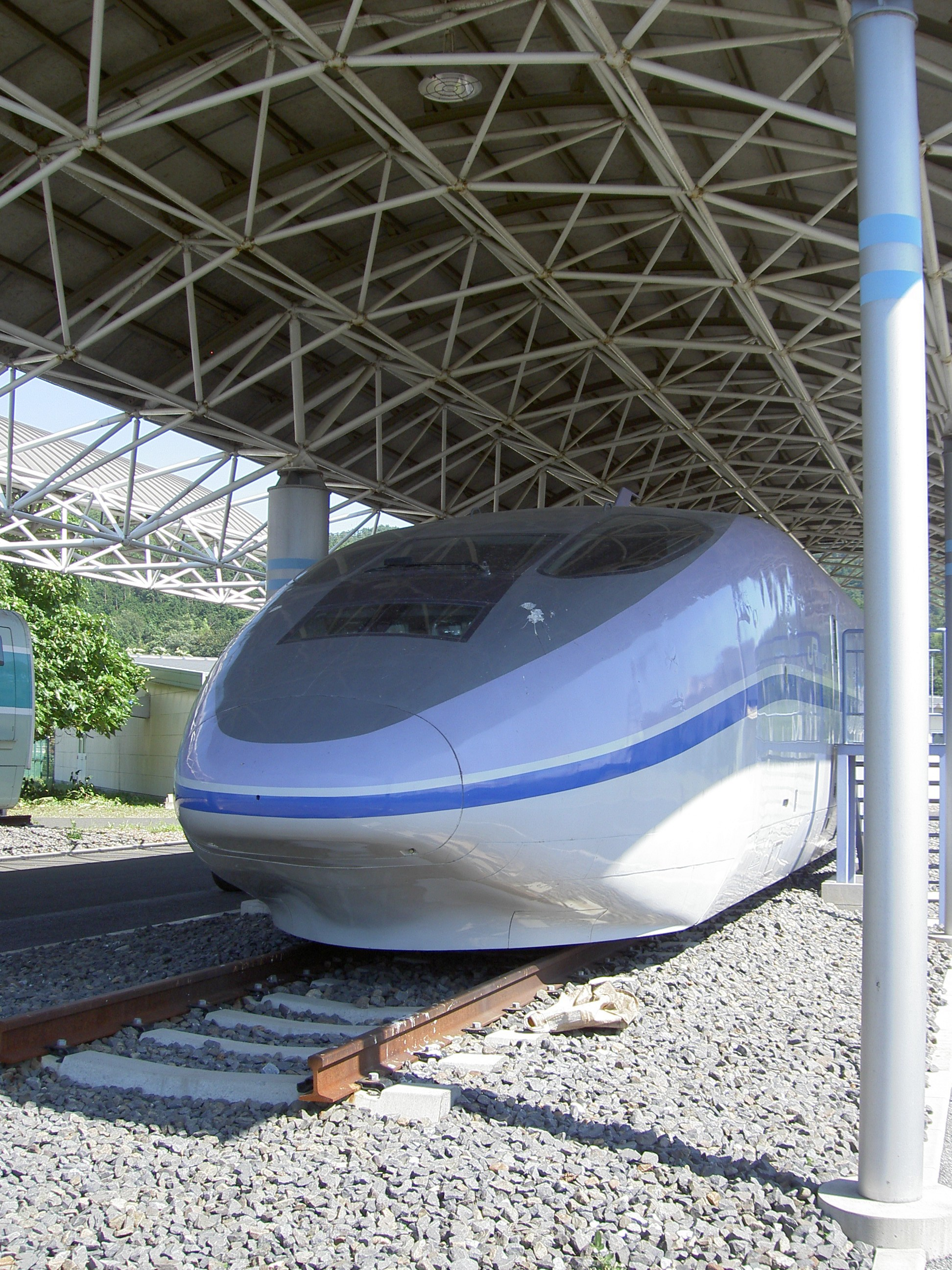 財団法人鉄道総合技術研究所風洞技術センター（滋賀県米原市）に静態保存されている新幹線500形900番台(WIN350)電車（投稿者自らが許可を受けて撮影）